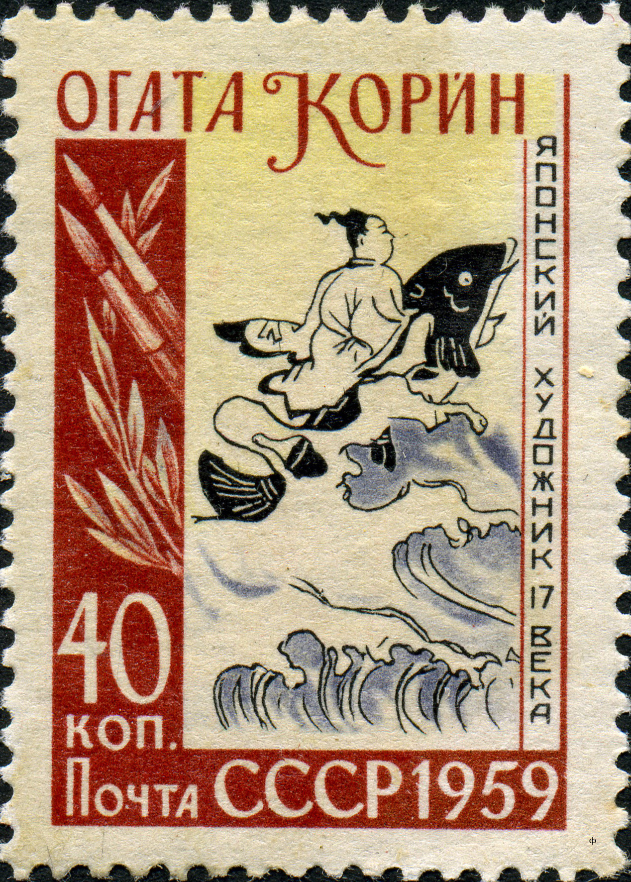 Марка СССР